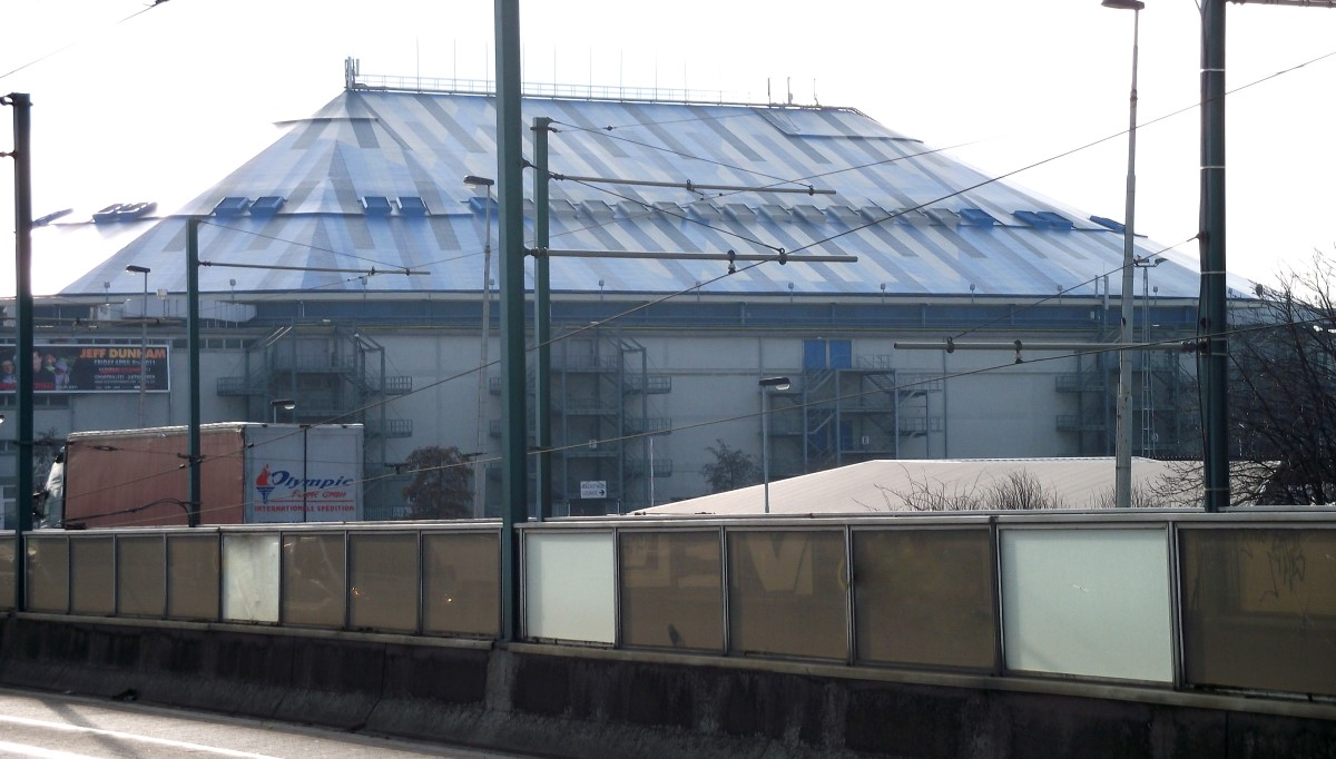 Sportpaleis Antwerpen in 2011